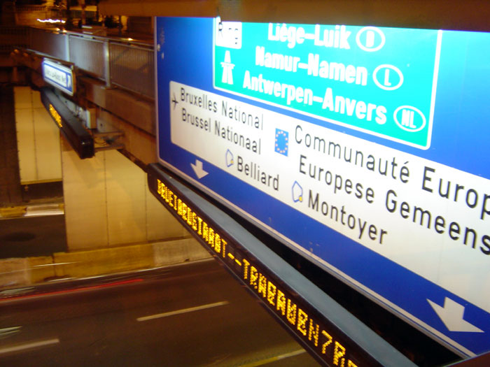 Troontunnel Señalización bilingüe en Bruselas (Bélgica).